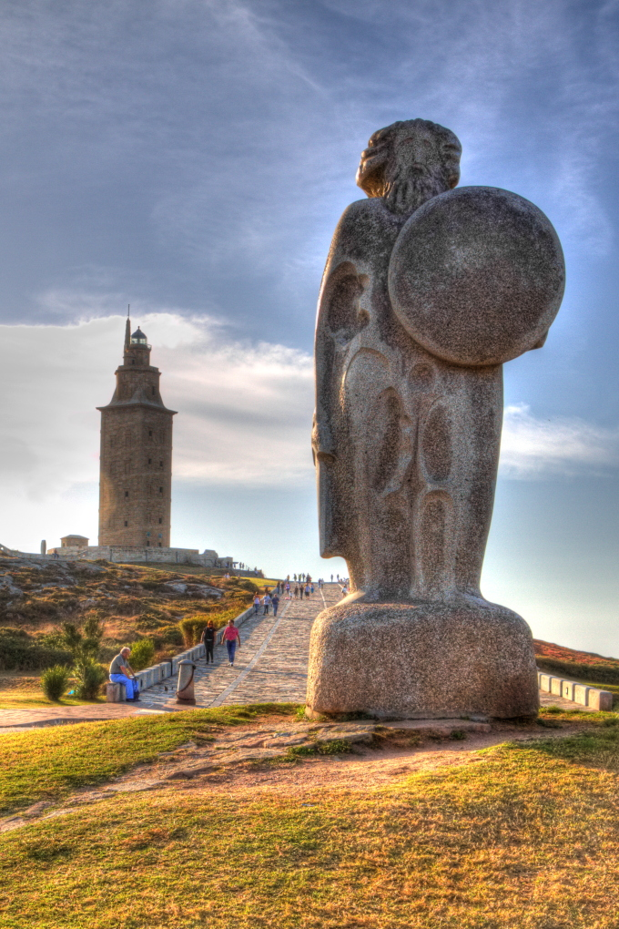 Estatua de Breogan con la torre de Hercules al fondo, A Coruña